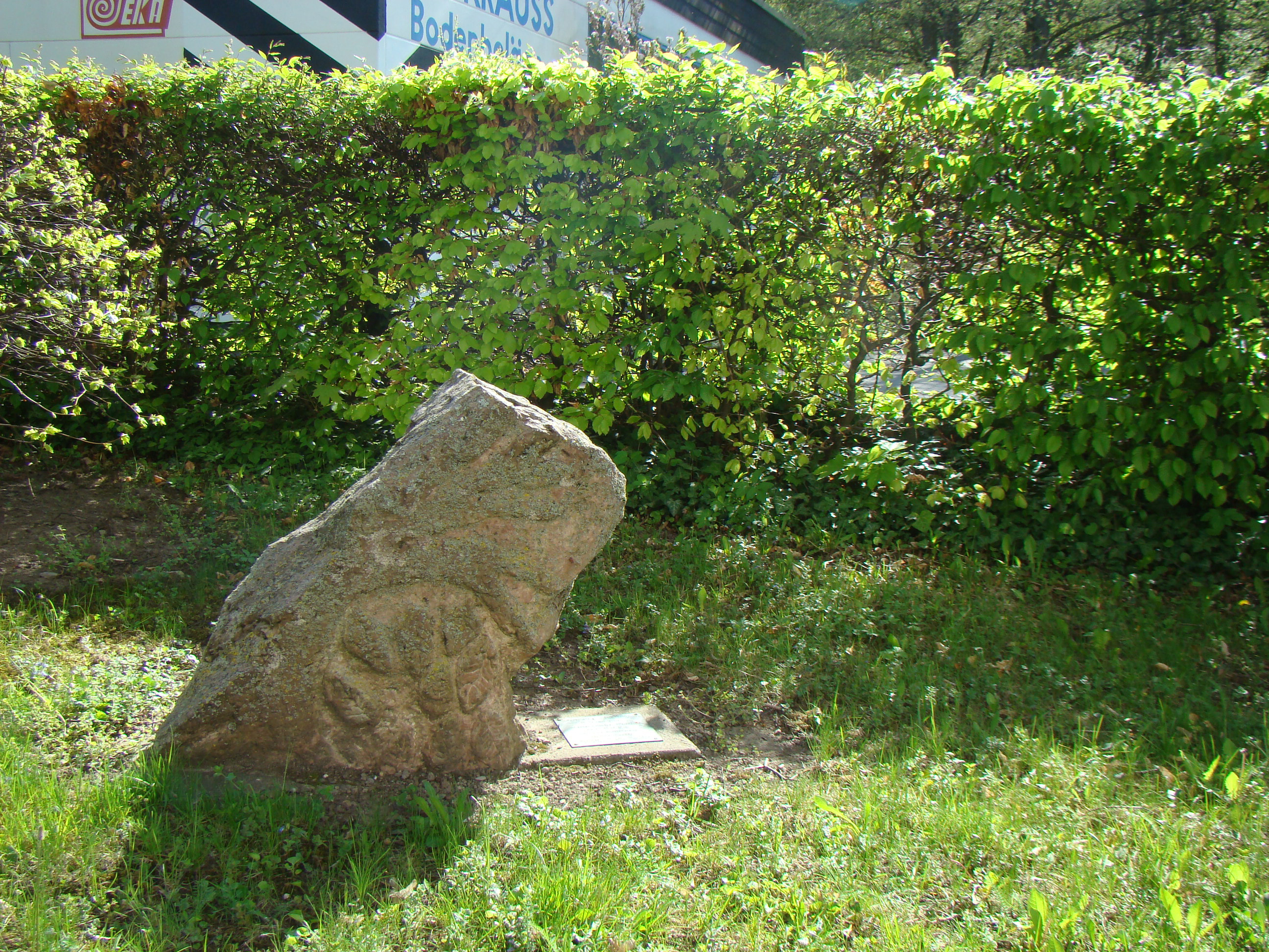 Gedenkstein für die letzten neun jüdischen Mitbürger bei der Jakobskirche in Adelsheim. Diese neun Personen wurden am 22. Oktober nach Gurs deportiert. Gedenkstein gestaltet von der 10. Klasse des EBG, errichtet im Oktober 2005.